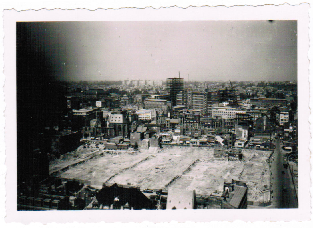 Frankfurt am Main 1952: Blick vom Dom über die zerstörte Altstadt nach Richtung IG Farbenhaus